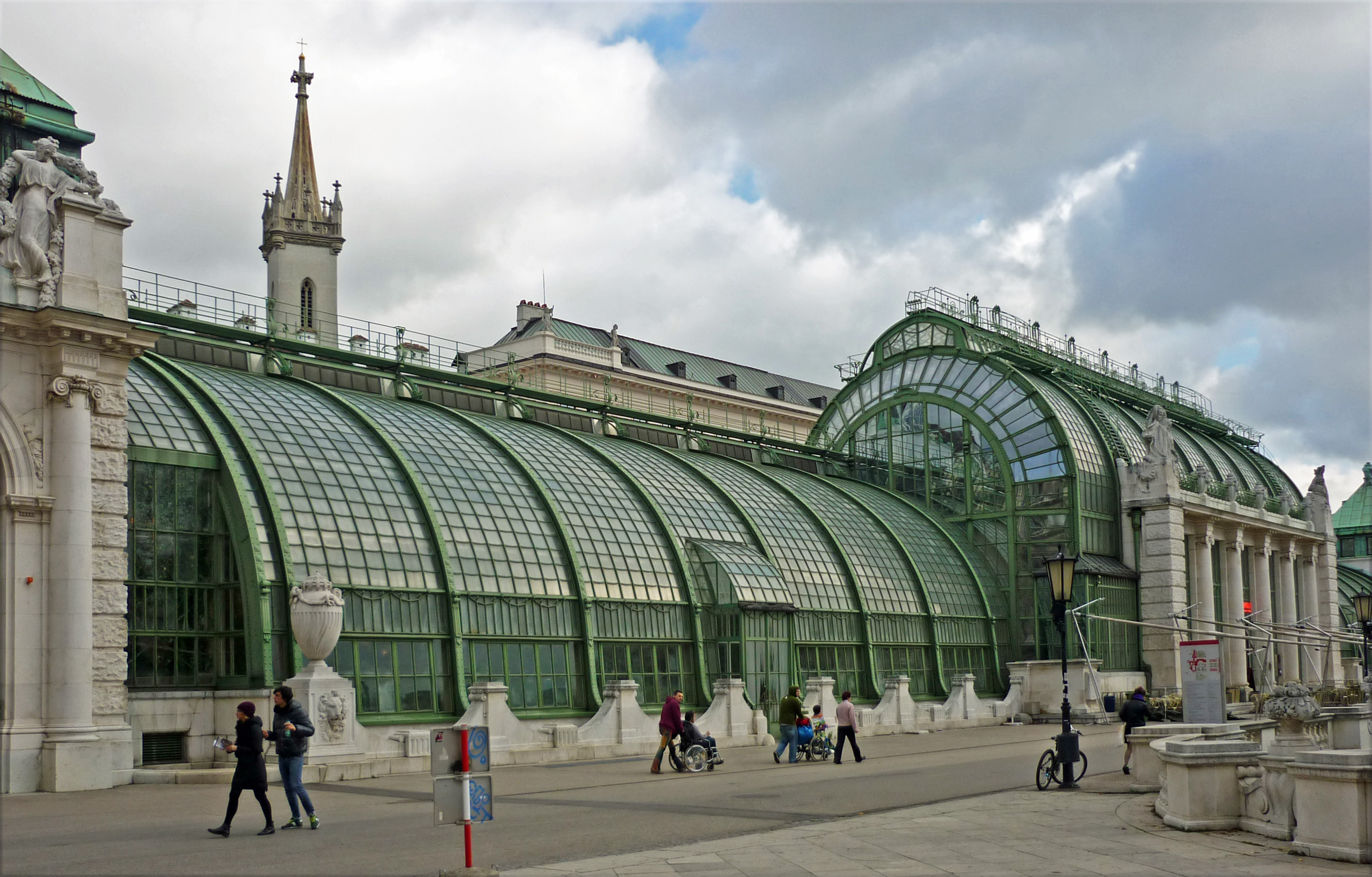 Palmenhaus in Wien, Burggarten